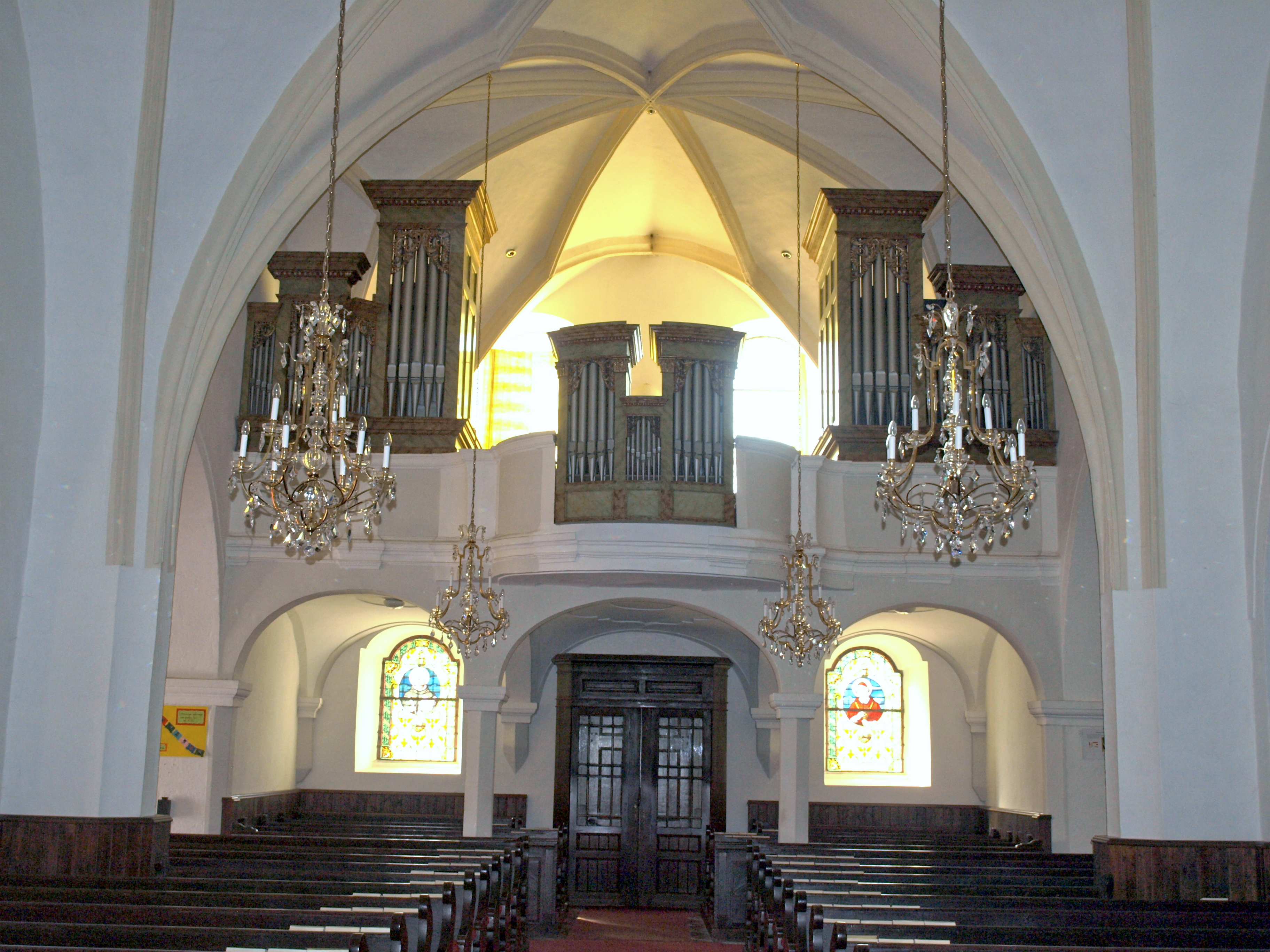 katholische Pfarrkirche heiliger Martin, Einblick nach Westen zur Empore mit Orgel der Fa. Rieger